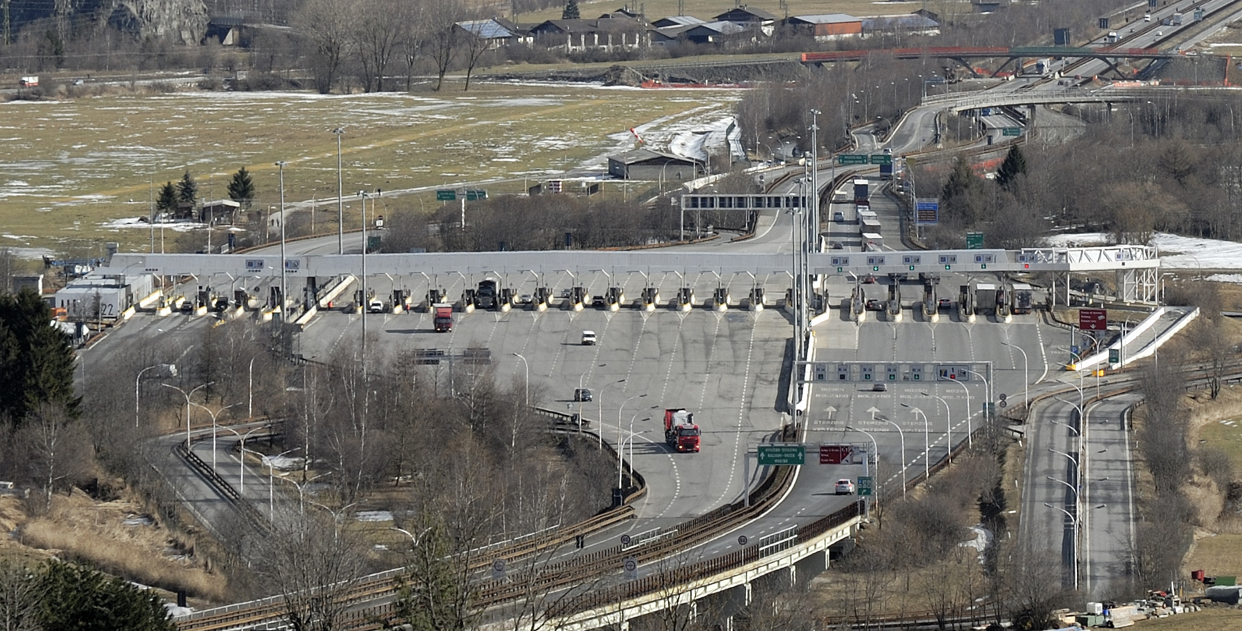 Mautstelle Sterzing der italienischen Brennerautobahn A22